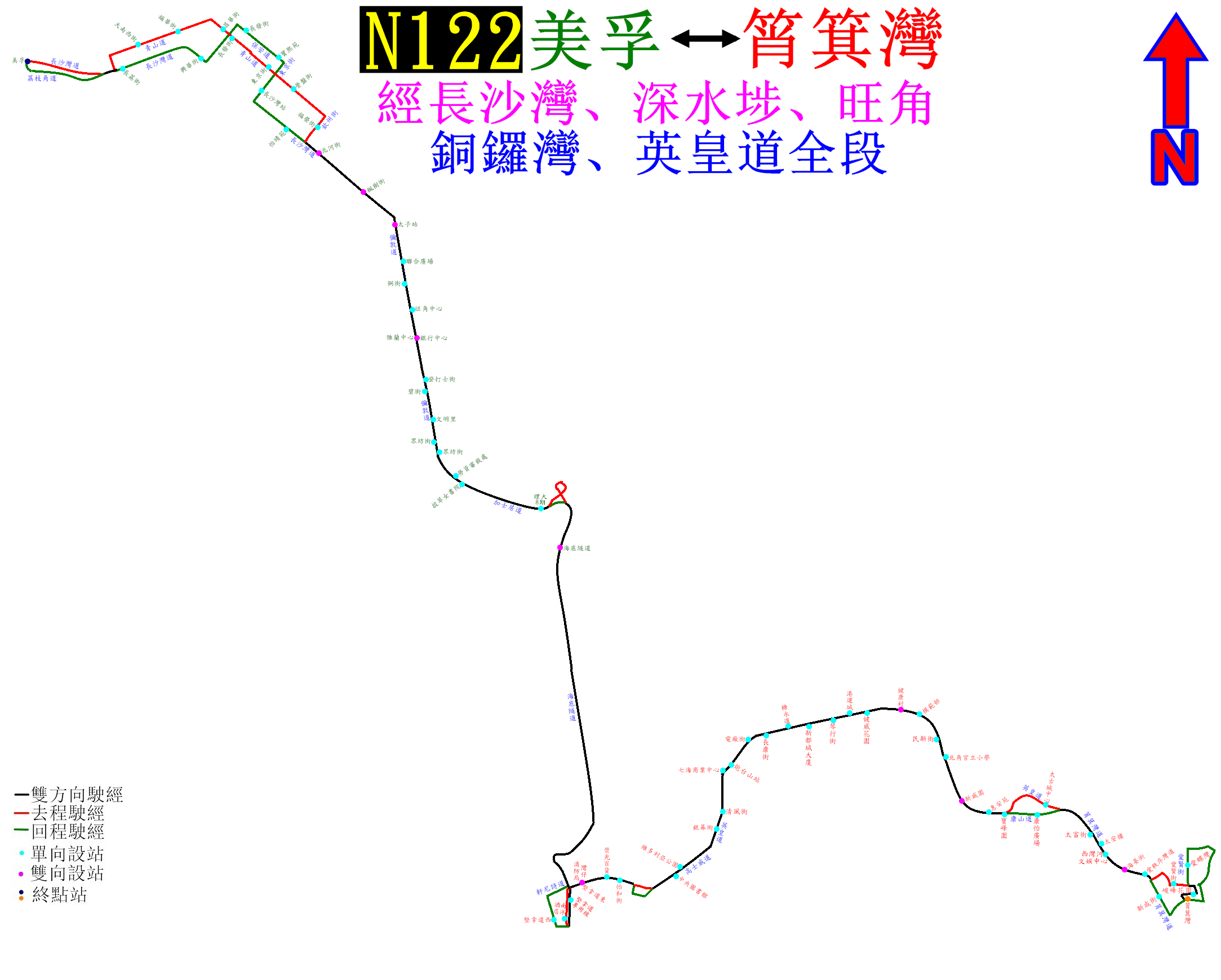 中文（香港）: 過海隧巴N122線的走線圖